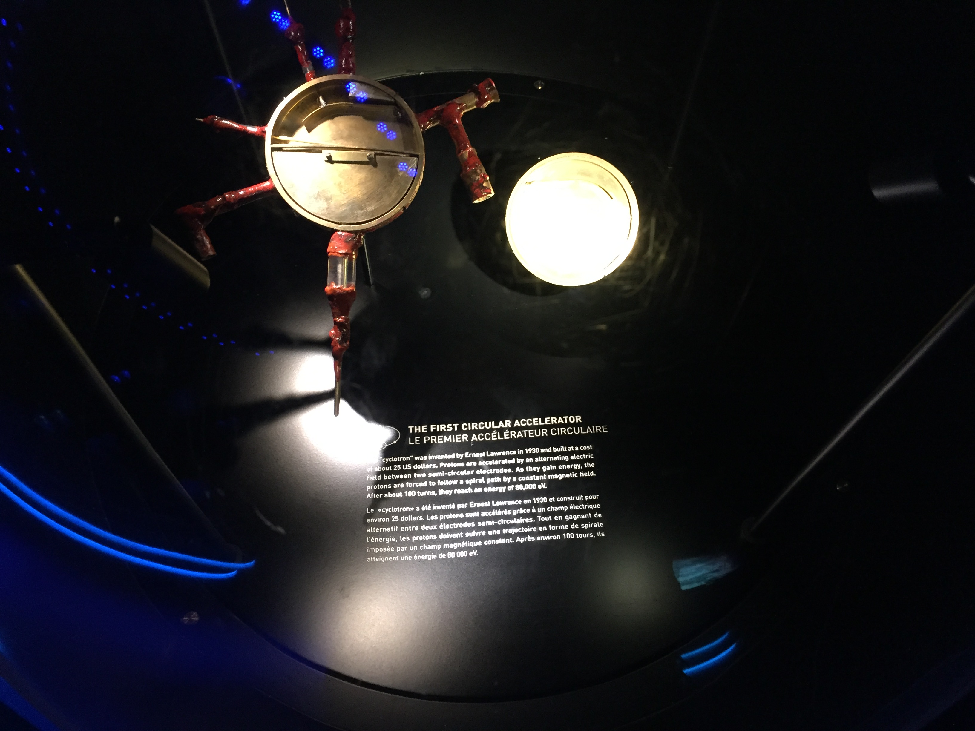 מיצג בגלובוס.הציקלוטרון הראשון